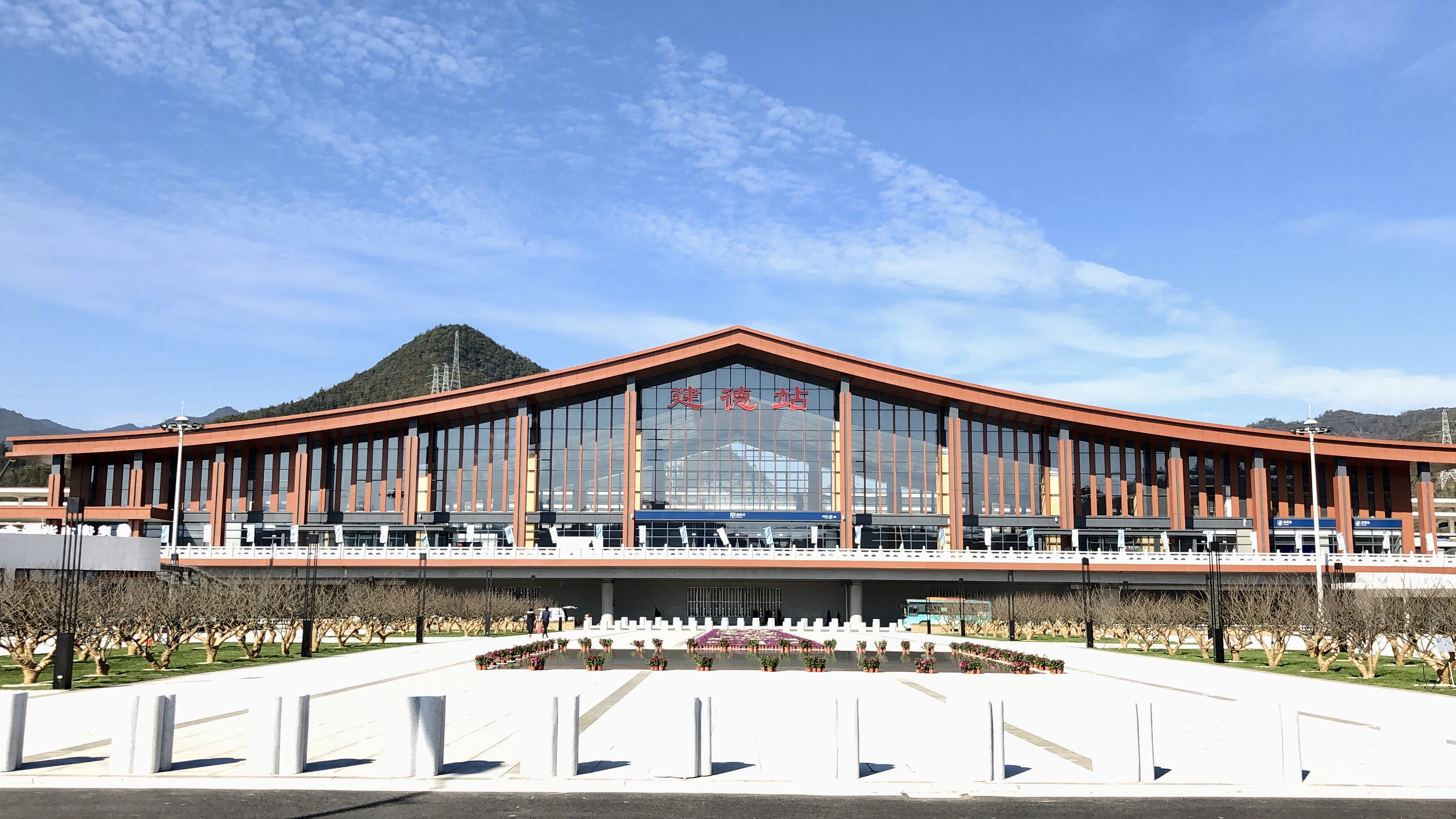 中文（中国大陆）: 开通运行后的建德站